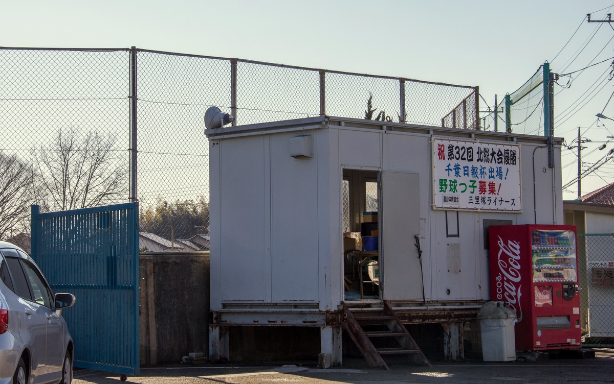 遠山スポーツ広場